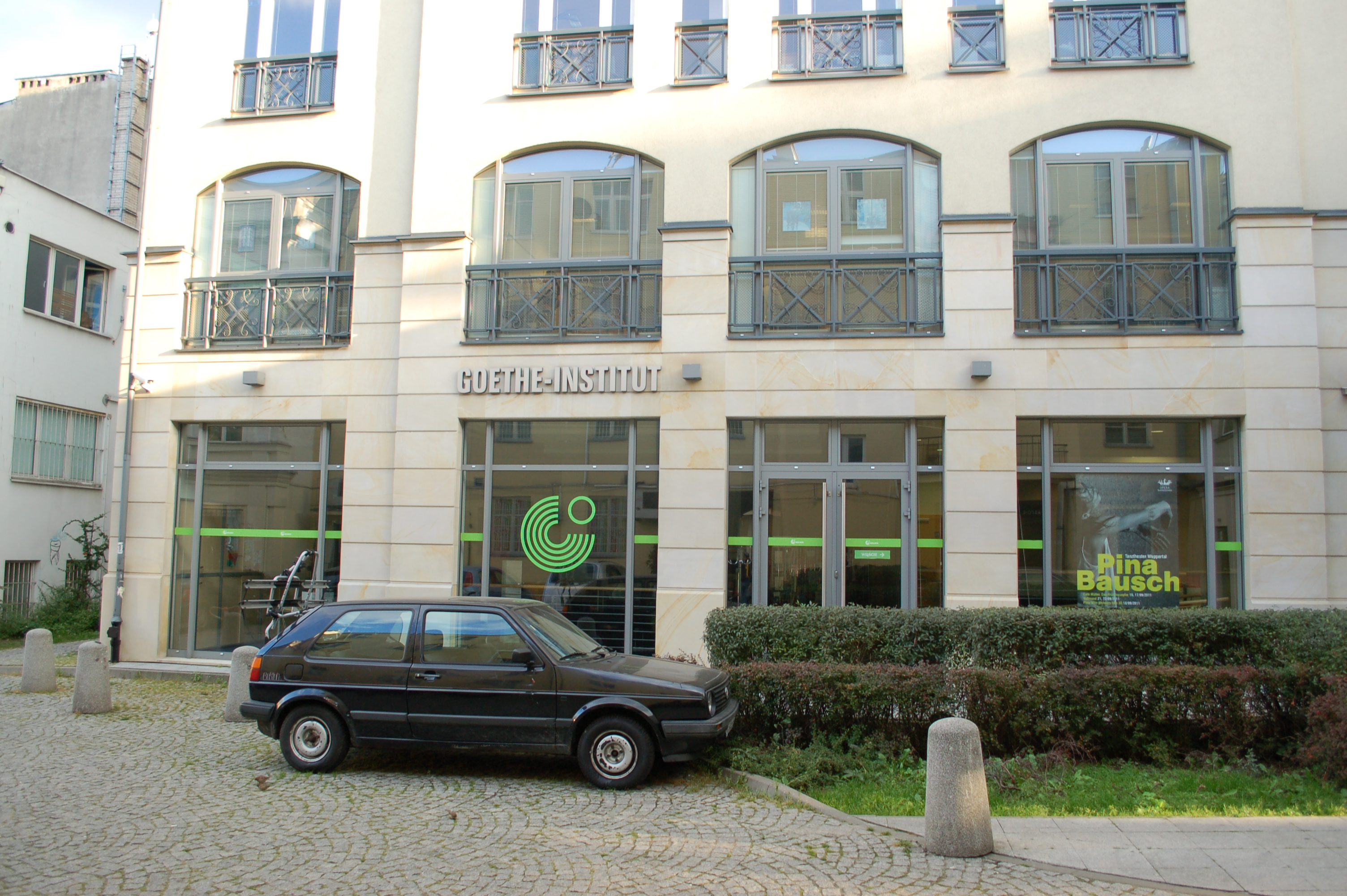 Warschau, Nowy Swiat und Chmielna Strassen